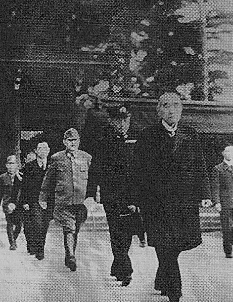 The cabinet minister who goes and worships in Ise Grand Shrine